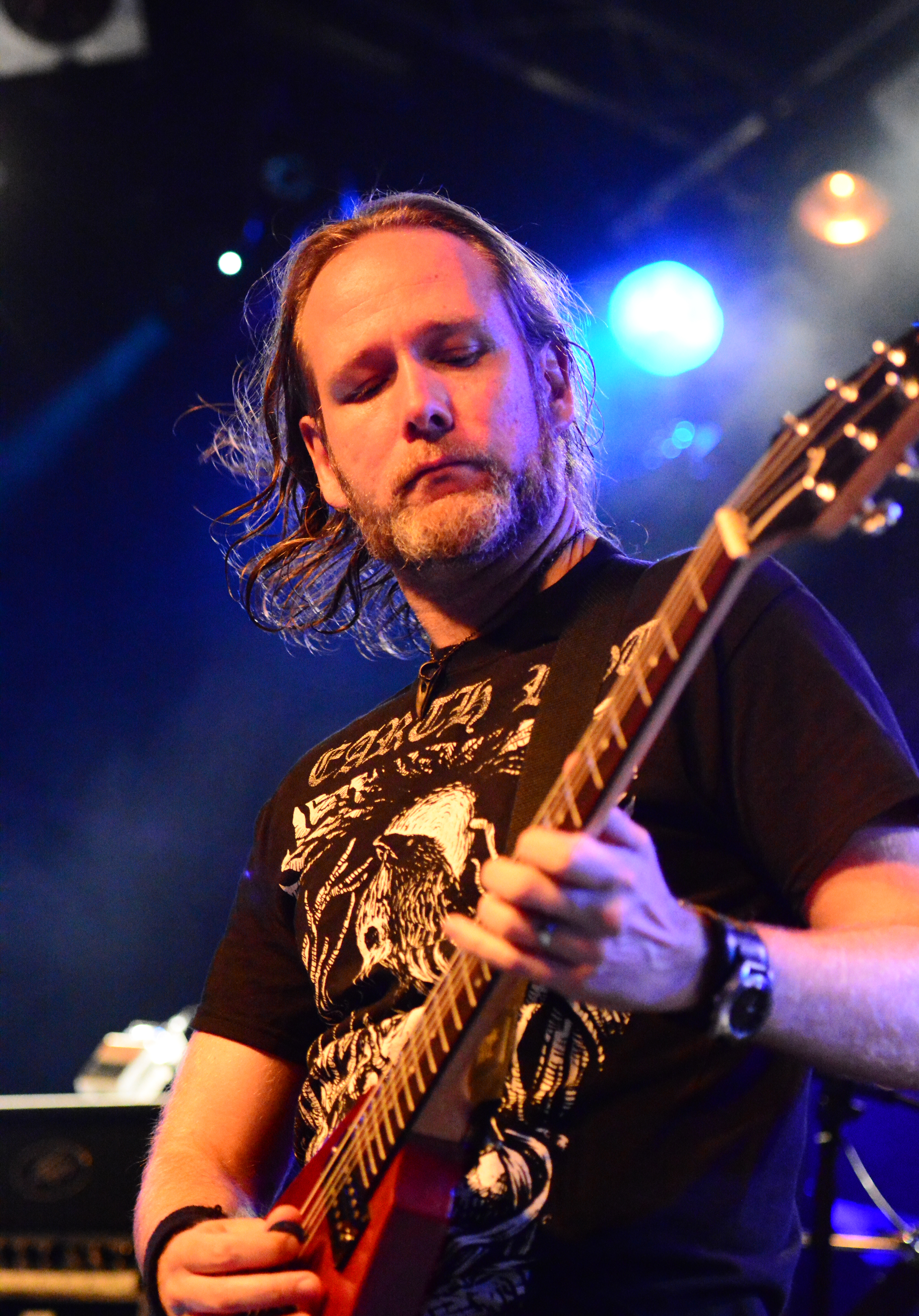 Niklas Sundin von Dark Tranquillity bei den Hamburg Metal Dayz 2014